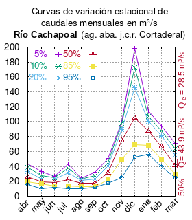 Curva de Variación Estacional Río Cachapoal 5 km abajo junta con río Cortaderal # Dirección General de Aguas, MOP # Cuenca del río Rapel # Diagnóstico y clasificación de los cursos y cuerpos de agua según objetivos de calidad. Cuenca del río Rapel. # Diciembre 2004 # url # pág. 54 abr 43.699 38.756 33.604 25.821 18.908 15.771 may 32.800 27.900 22.600 19.600 16.500 10.300 jun 26.919 24.916 22.608 18.528 14.049 11.672 jul 43.601 37.617 31.378 21.955 13.585 9.787 ago 24.402 22.877 21.030 17.500 13.153 10.599 sep 32.365 27.550 23.028 17.229 13.274 11.913 oct 50.277 45.619 40.268 31.142 21.937 17.514 nov 99.800 97.500 89.500 74.800 49.500 25.000 dic 198.376 172.549 145.625 104.958 68.833 52.441 ene 114.700 107.300 100.300 87.100 68.200 55.800 feb 93.906 87.911 80.650 66.772 49.679 39.638 mar 71.234 63.335 54.931 41.845 29.929 24.581